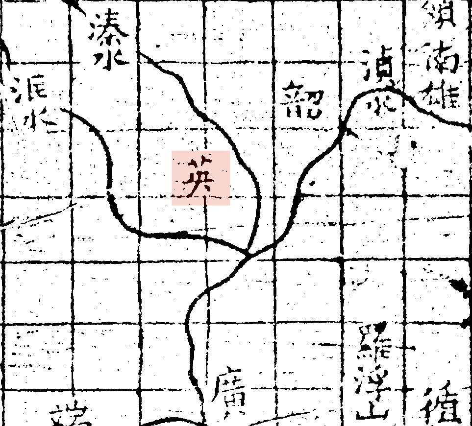 粵語: 禹跡圖中嘅英洲